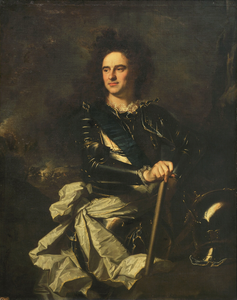 Portrait de Louis Auguste d'Albert, duc de Chaulnes, vidame d'Amiens